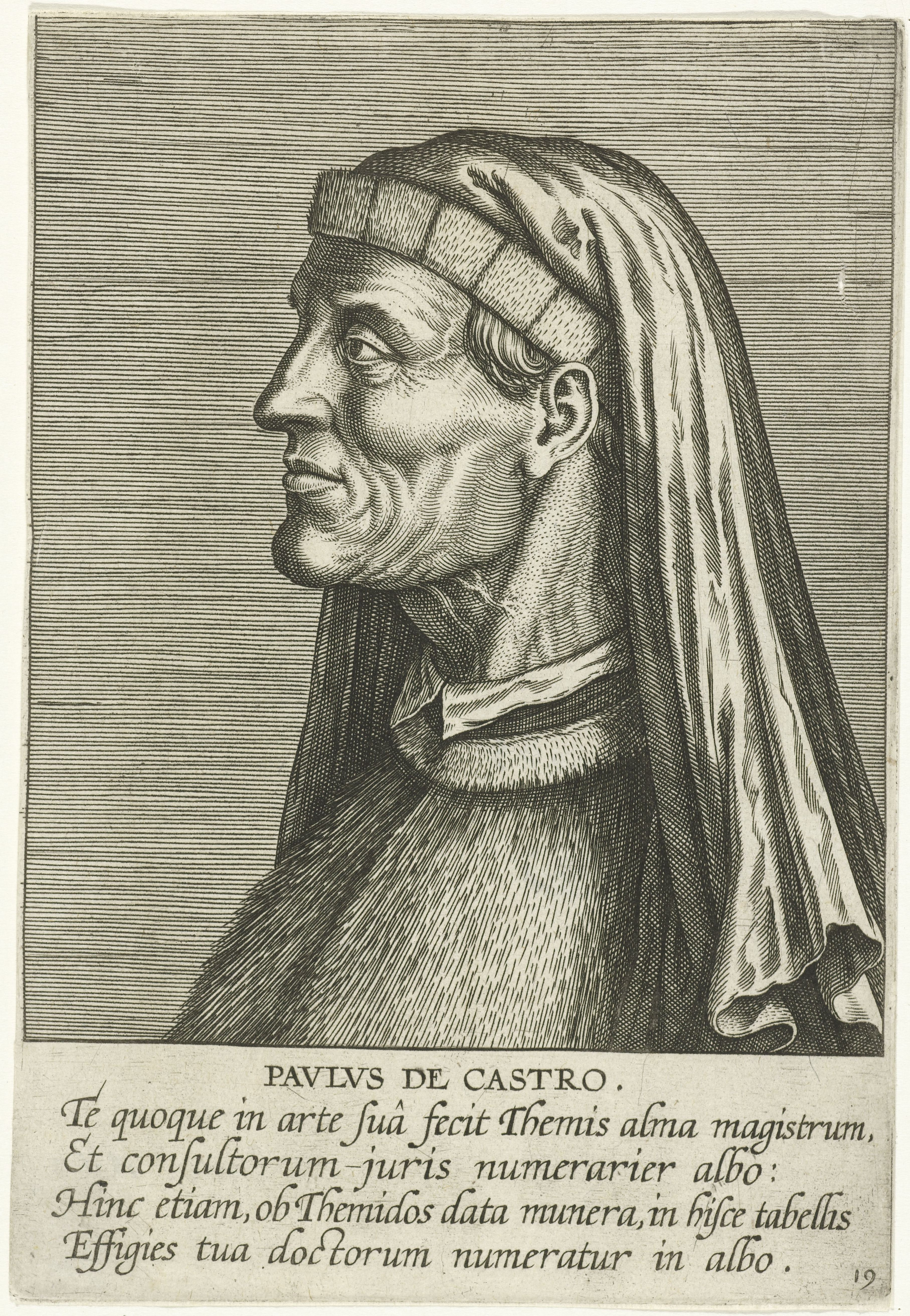 IdentificatieTitel(s): Portret van Paolo da CastroPavlvs de Castro (titel op object)Portretten van beroemde geleerden (serietitel)Imagines L. Doctorum Virorum (serietitel)Objecttype: prent Serienummer: 19/50Objectnummer: RP-P-1909-1064Catalogusreferentie: New Hollstein Dutch 605Opschriften / Merken: verzamelaarsmerk, verso midden, gestempeld: Lugt 2228Omschrijving: Portret van Paolo da Castro, een Italiaanse jurist en professor in de rechten. Profiel naar links. De prent heeft een Latijns onderschrift en maakt deel uit van een serie van beroemde geleerden.VervaardigingVervaardiger: prentmaker: Philips Galleschrijver: Franciscus Raphelengius (I)uitgever: Philips Galle (mogelijk)uitgever: Theodoor Galle (mogelijk)Plaats vervaardiging: AntwerpenDatering: 1587 - 1606Fysieke kenmerken: gravureMateriaal: papier Techniek: graveren (drukprocedé)Afmetingen: blad: h 169 mm × b 116 mmOnderwerpWie: Paolo de CastroVerwerving en rechtenVerwerving: aankoop 1909Copyright: Publiek domein